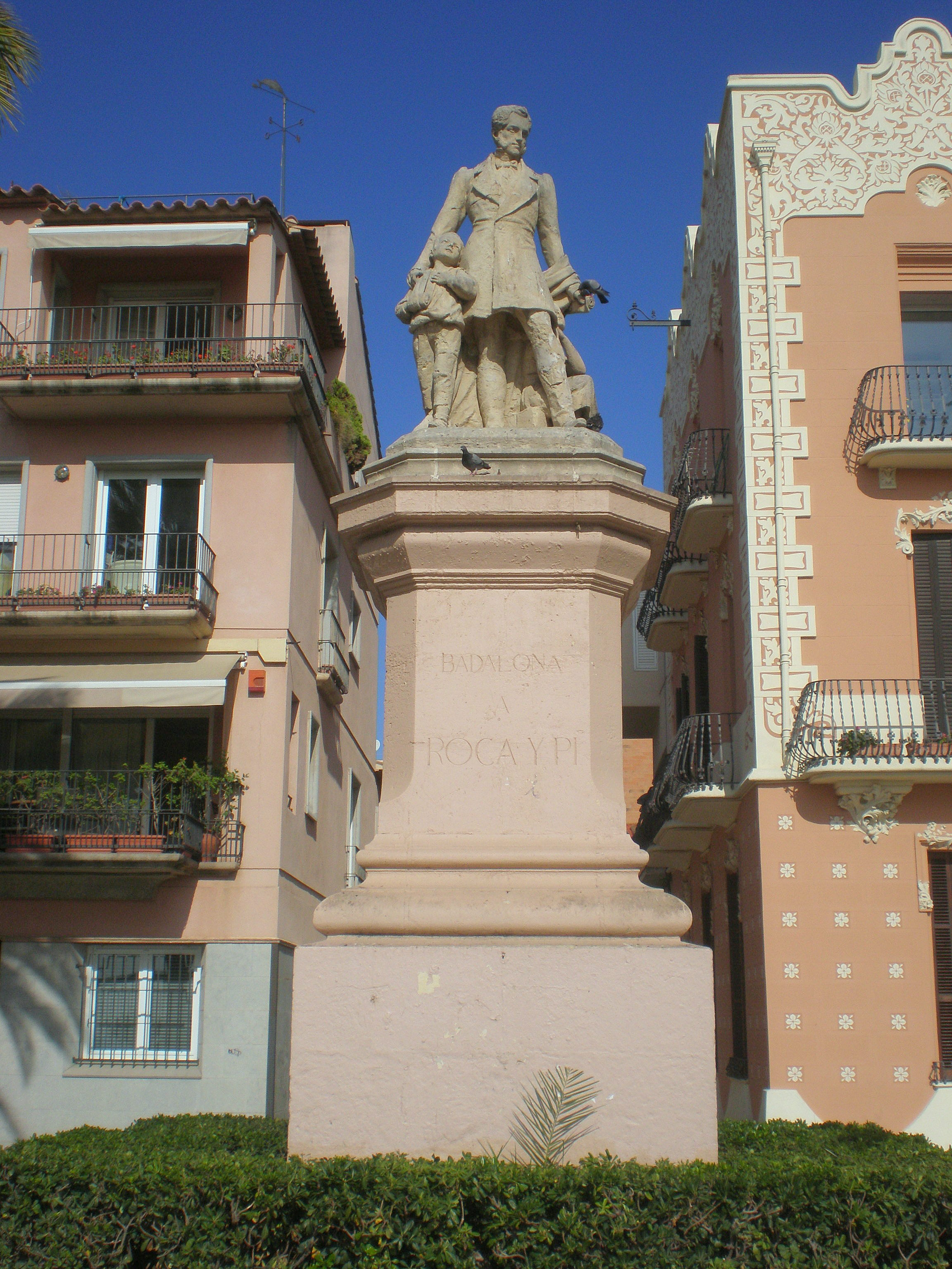 Monument a Roca i Pi, baró de Marmellar, empresari i filàntrop establert a Badalona i que donà els seus bens a les persones pobres domiciliades a Badalona.